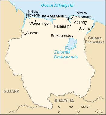 Mapa Surinamu, polska wersja mapy z CIA World Factbook